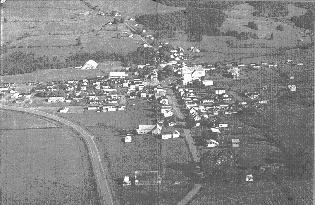 Prise de vue aérienne du village de Ham-Nord en 1988.